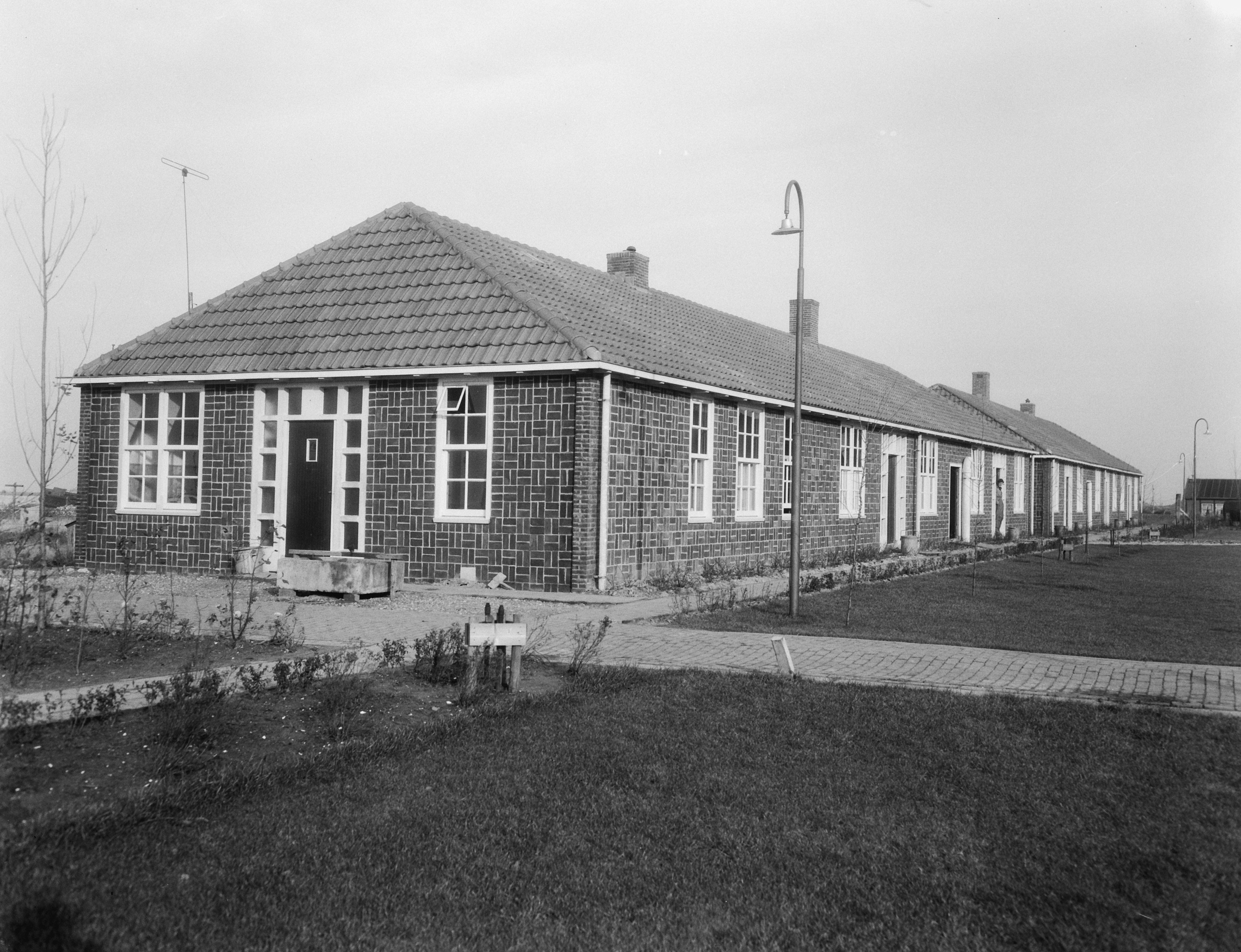 Barak gebruikt bij bouw gemaal Wortman bij Lelystad